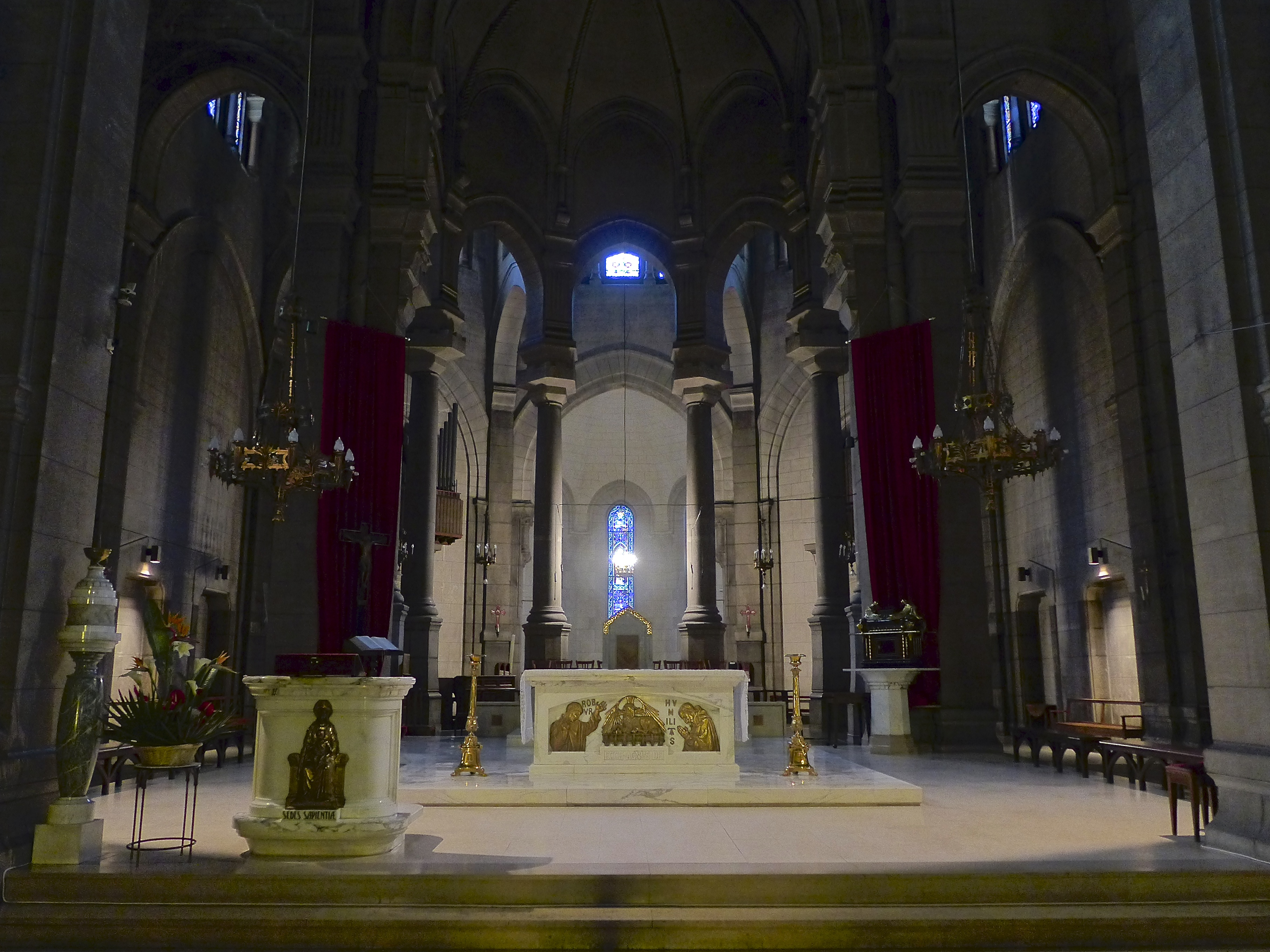 Le choeur de la cathédrale Saint-Charles Borromée, située Place Jean Jaurès à Saint-Etienne.